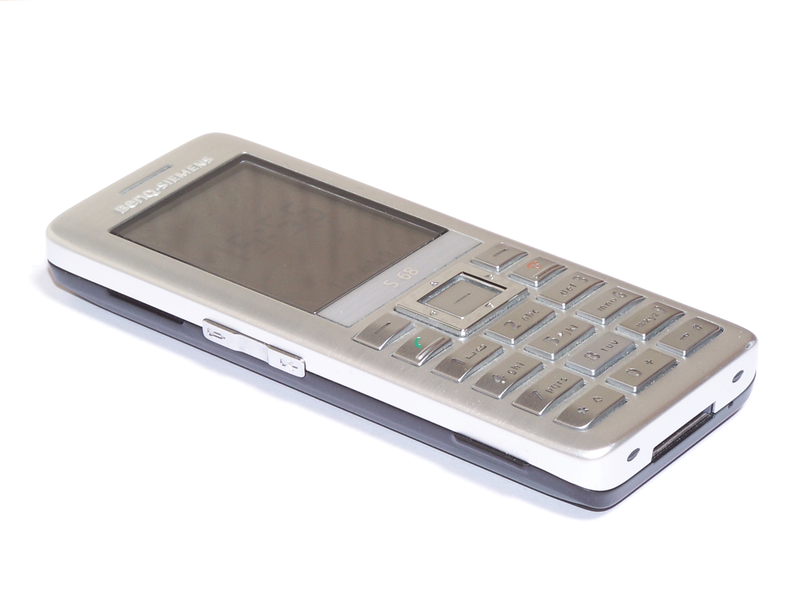 BenqSiemens S68